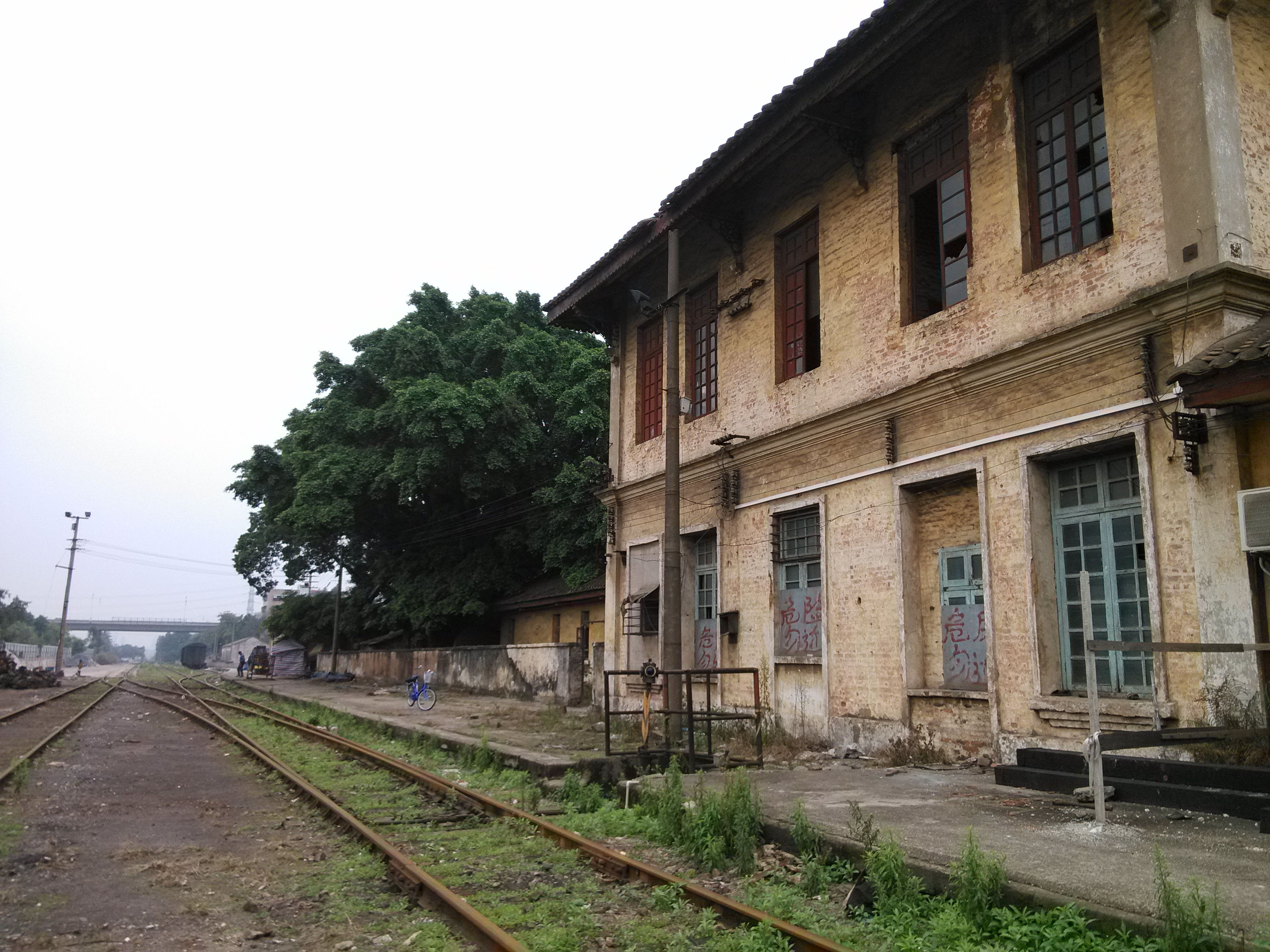 中文（中国大陆）: 该火车站仍在使用中，目前作货运使用。但车站中的建筑早已废弃，成为危楼。